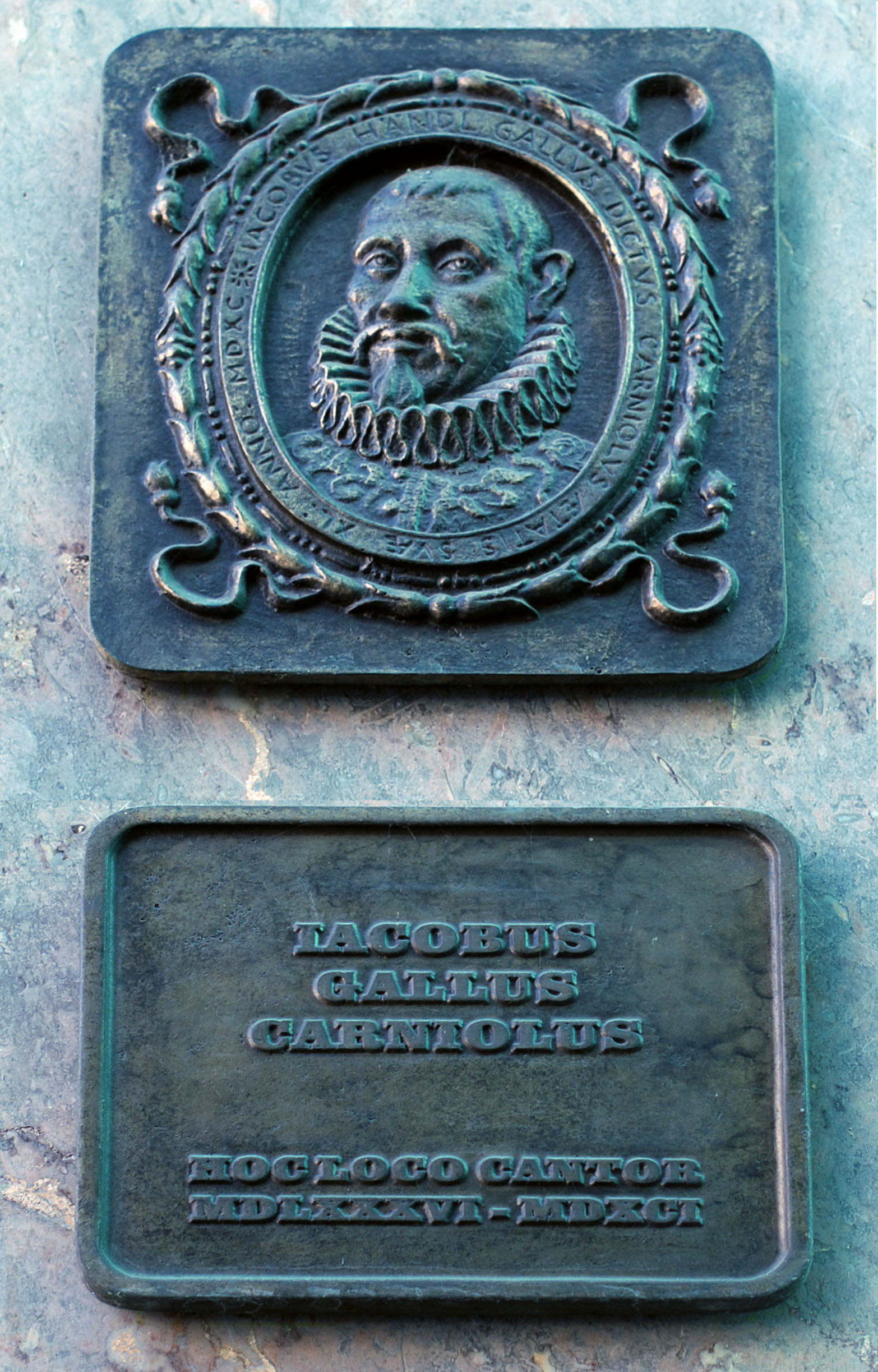 Gedenktafel in Prag, Na zábradlí 209/4, Staré Město.